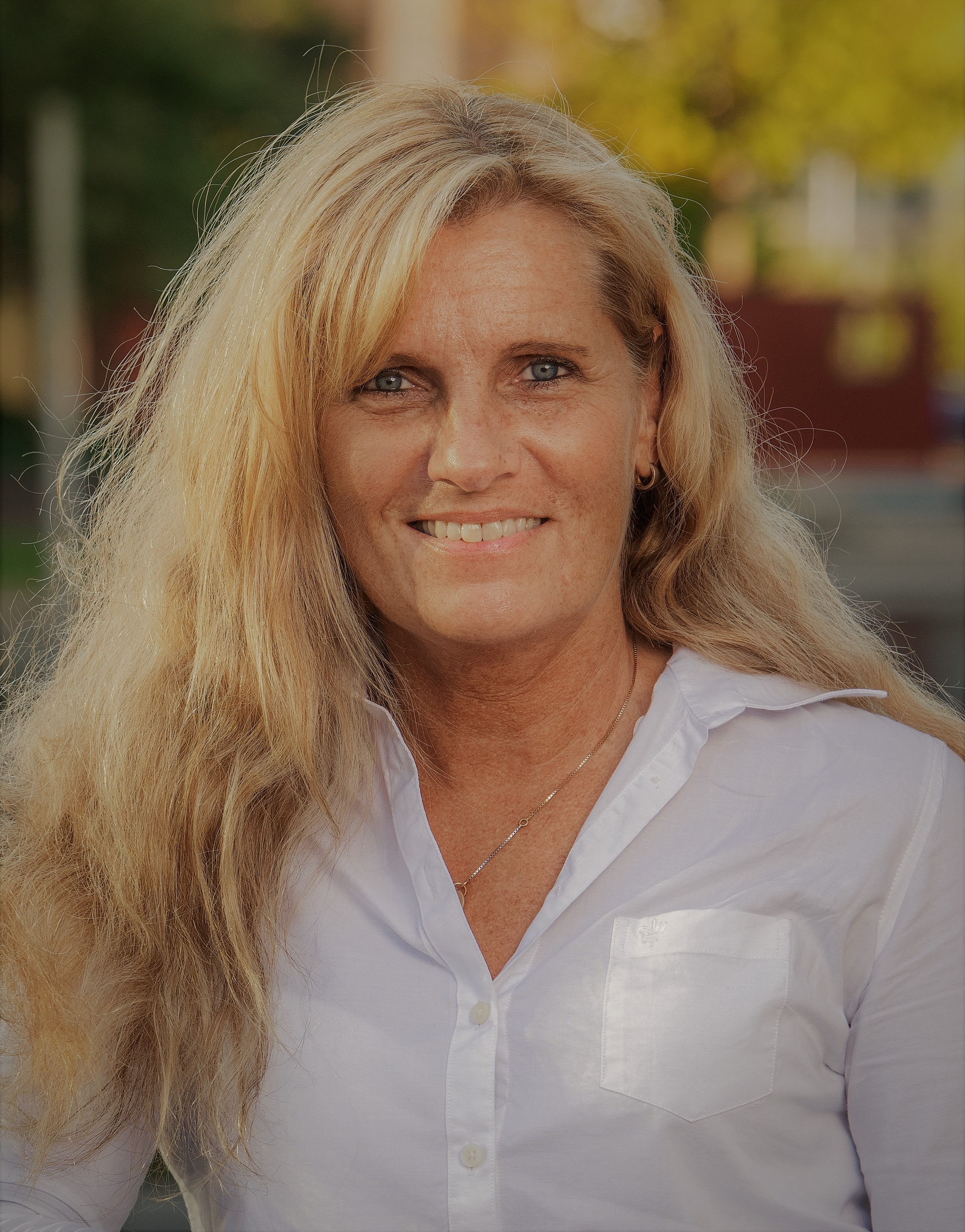 Mona Holmqvist 2018